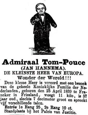 reclamefolder uit 1869 Zoon van Pieter Philippus Hannema en Baukje Jans Hannema